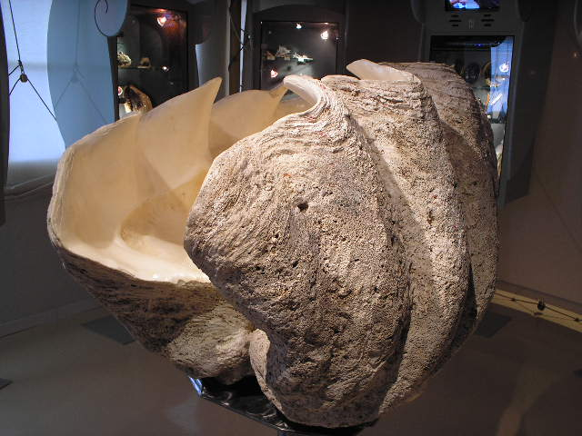 Afrika Múzeum, Ile d'Aix, Franciaország